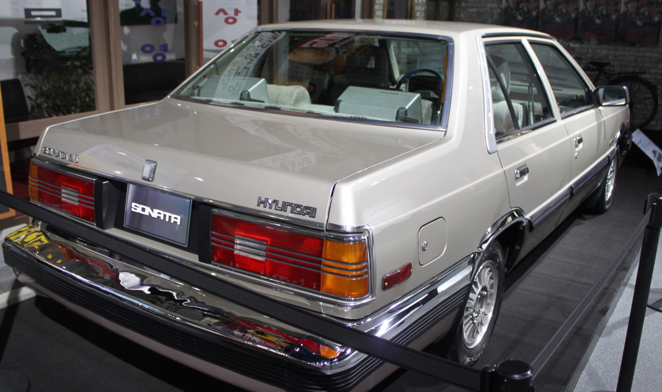 1987년에 생산된 소나타 1세대